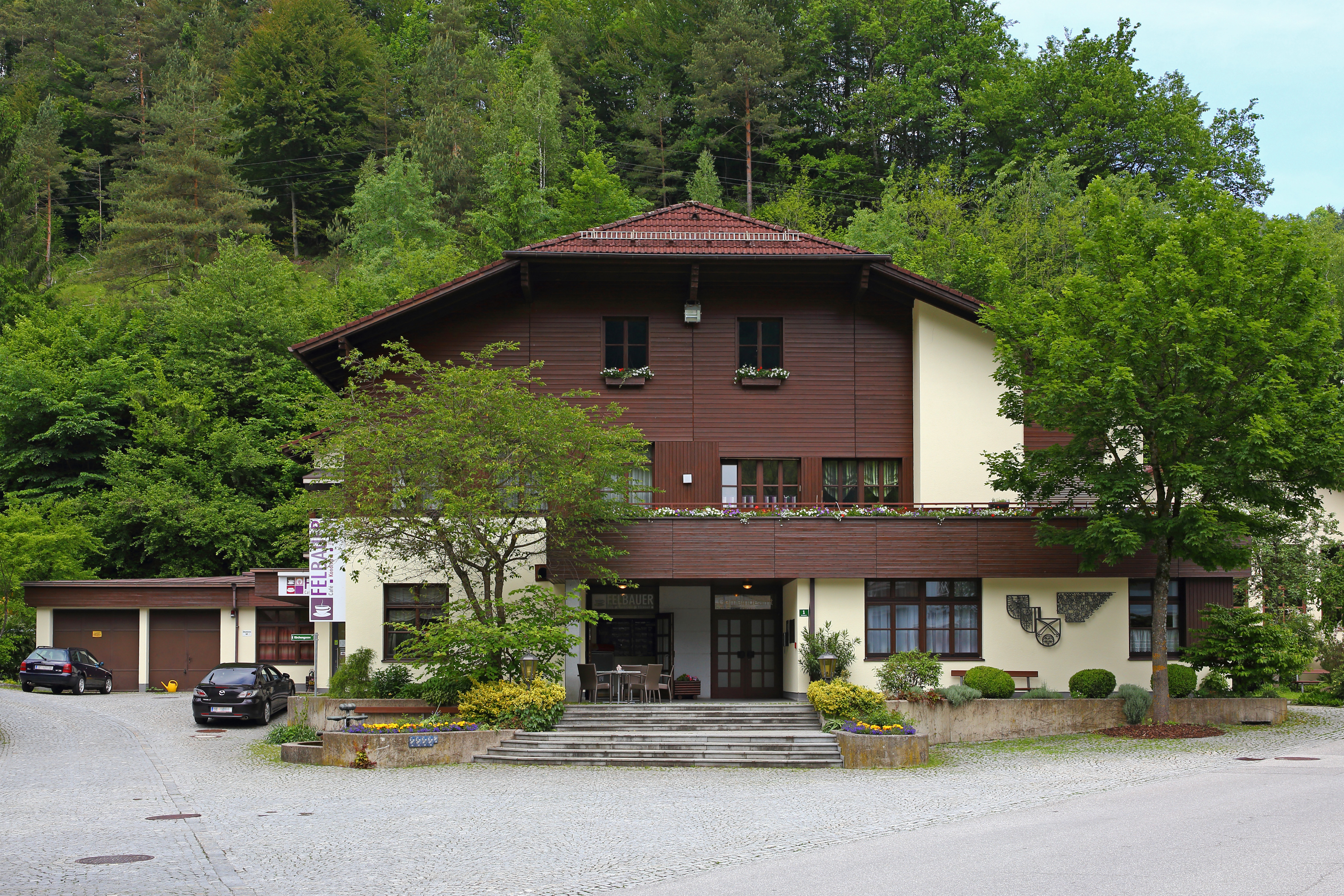 Gemeindeamt in Laussa (Bezirk Steyr-Land)